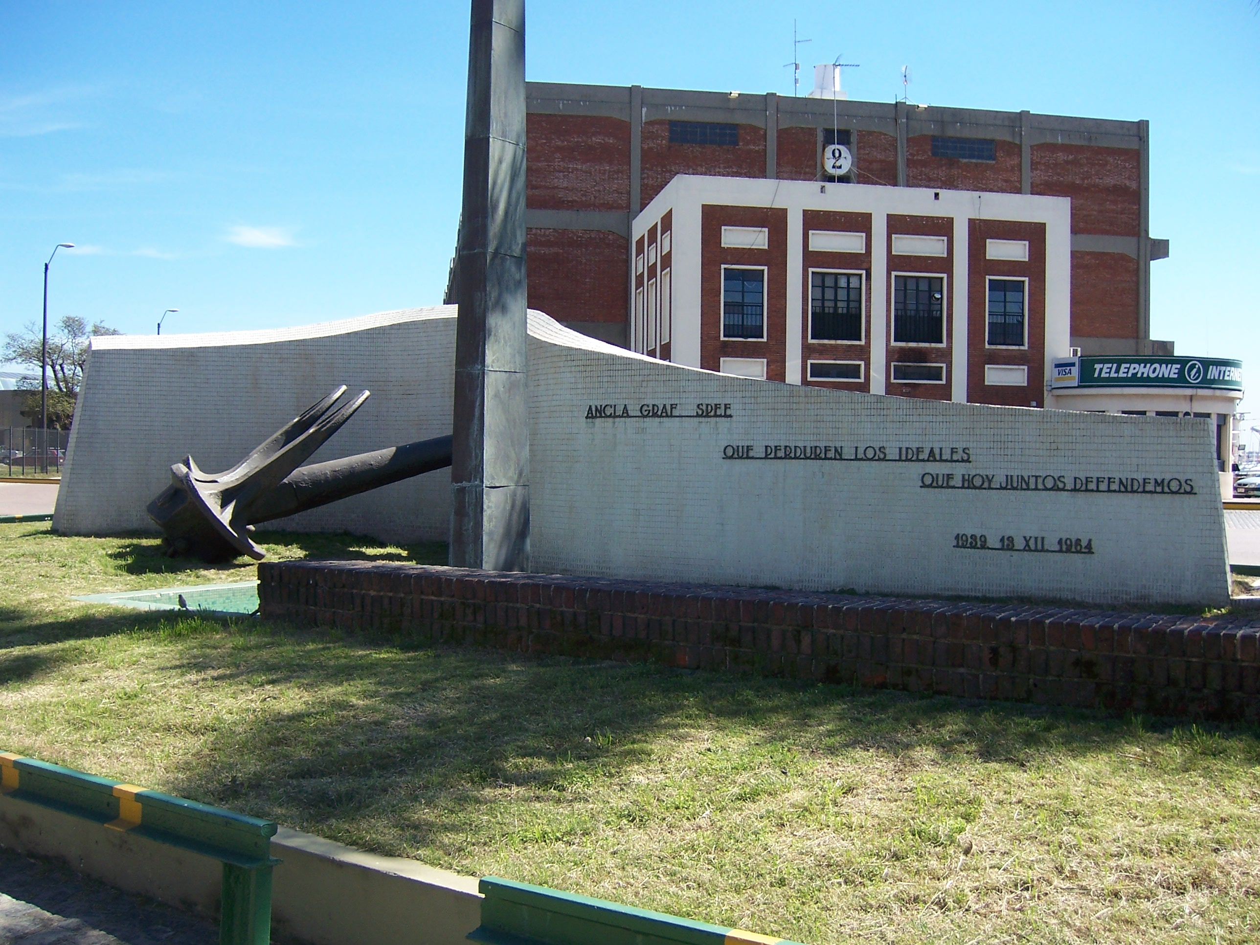 Ancla del Graf Spee exhibida en el puerto de Montevideo.